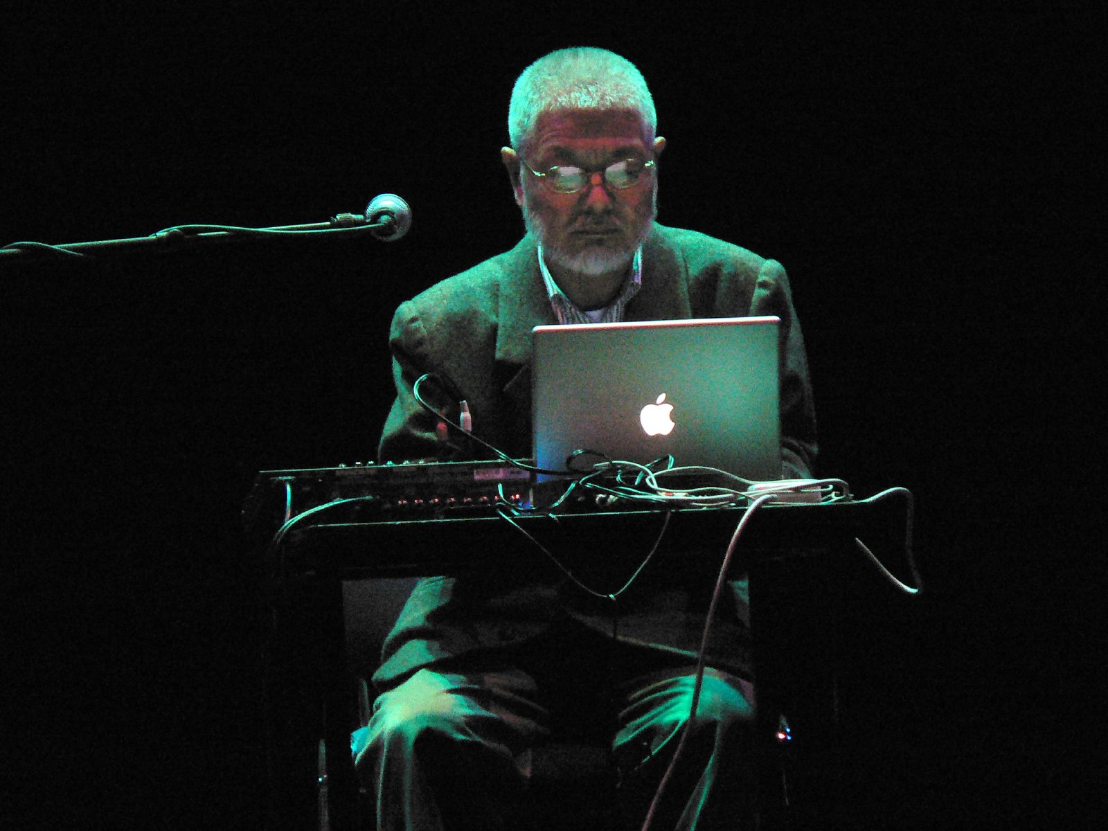 Composer Yasunao Tone